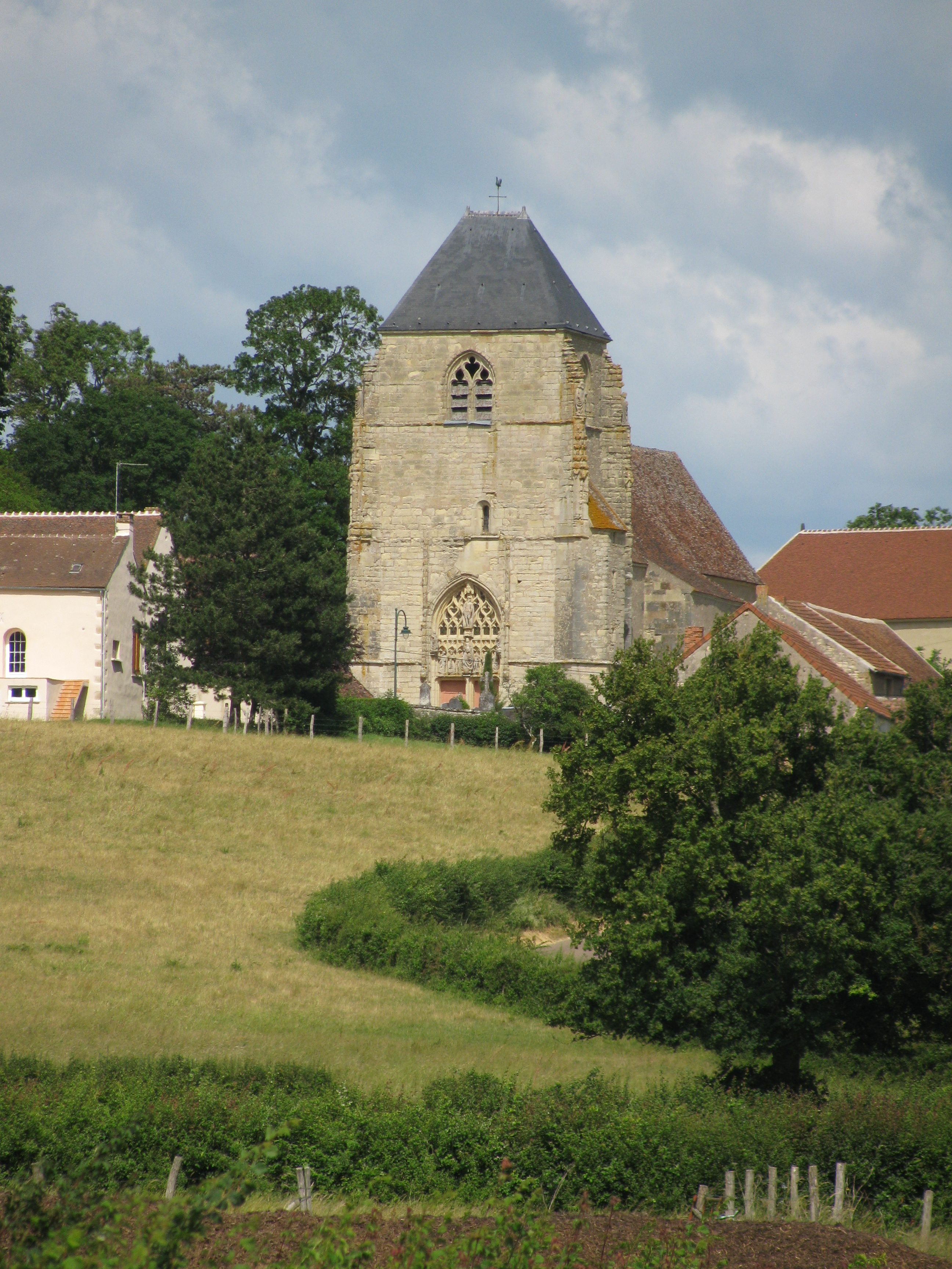 L'église Saint Hilaire de Challement.